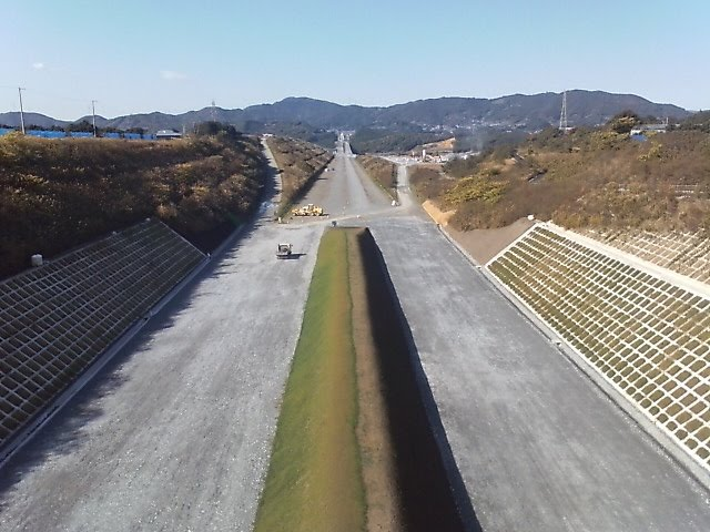 新東名高速道路（第二東名）の建設現場。浜松市北区灰木および四大地の付近。下り方面。Panoramioより転載。